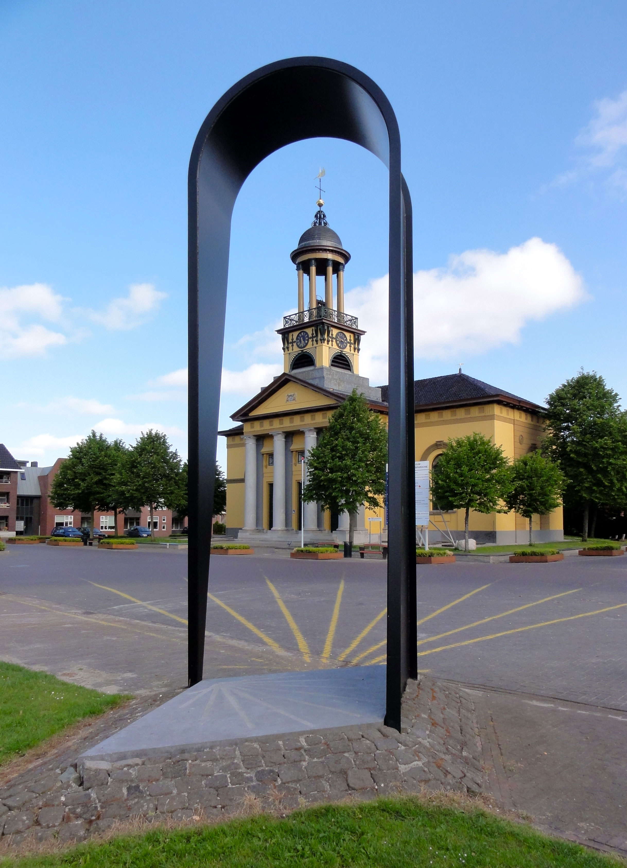 Markering pelgrimsroute door Henk Rusman bij de Groate Kerk in Sint-Jacobiparochie